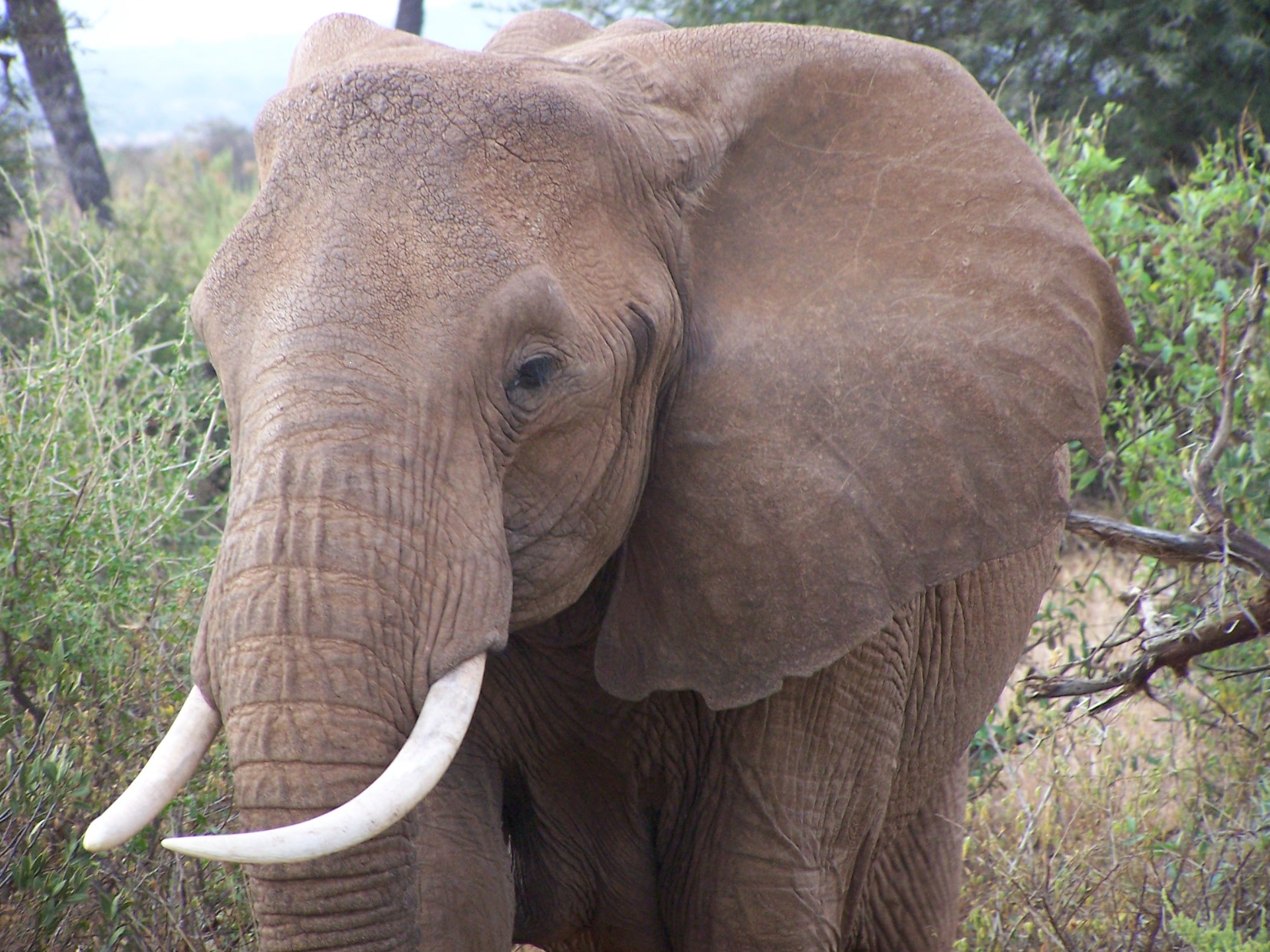 Elephant on Safari in Kenya